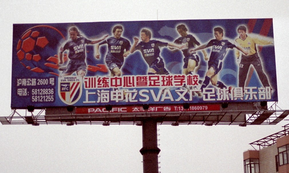 reclamebord